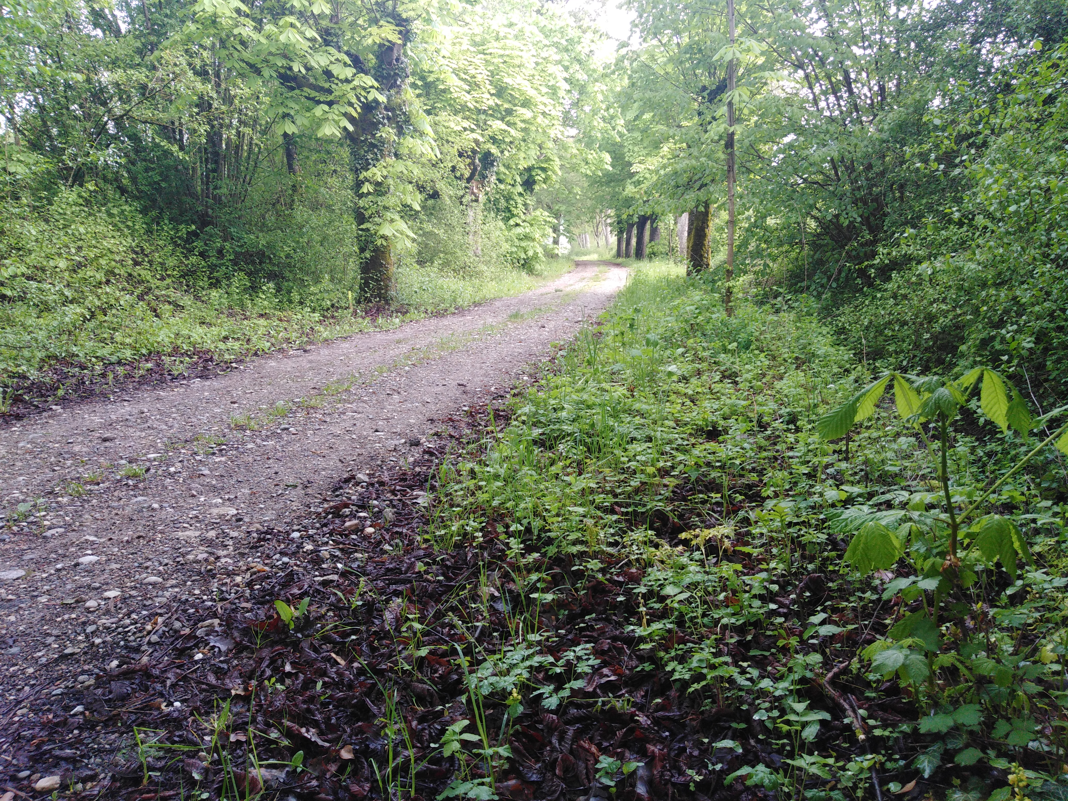 Lauchringen, Gemeinde im Landkreis Waldshut in Baden Württemberg. Gemarkung Oberlauchringen: Römerstraße (aufwärts nach Bechtersbohl).